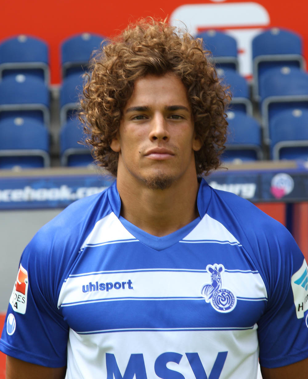 Rolf Feltscher 2015